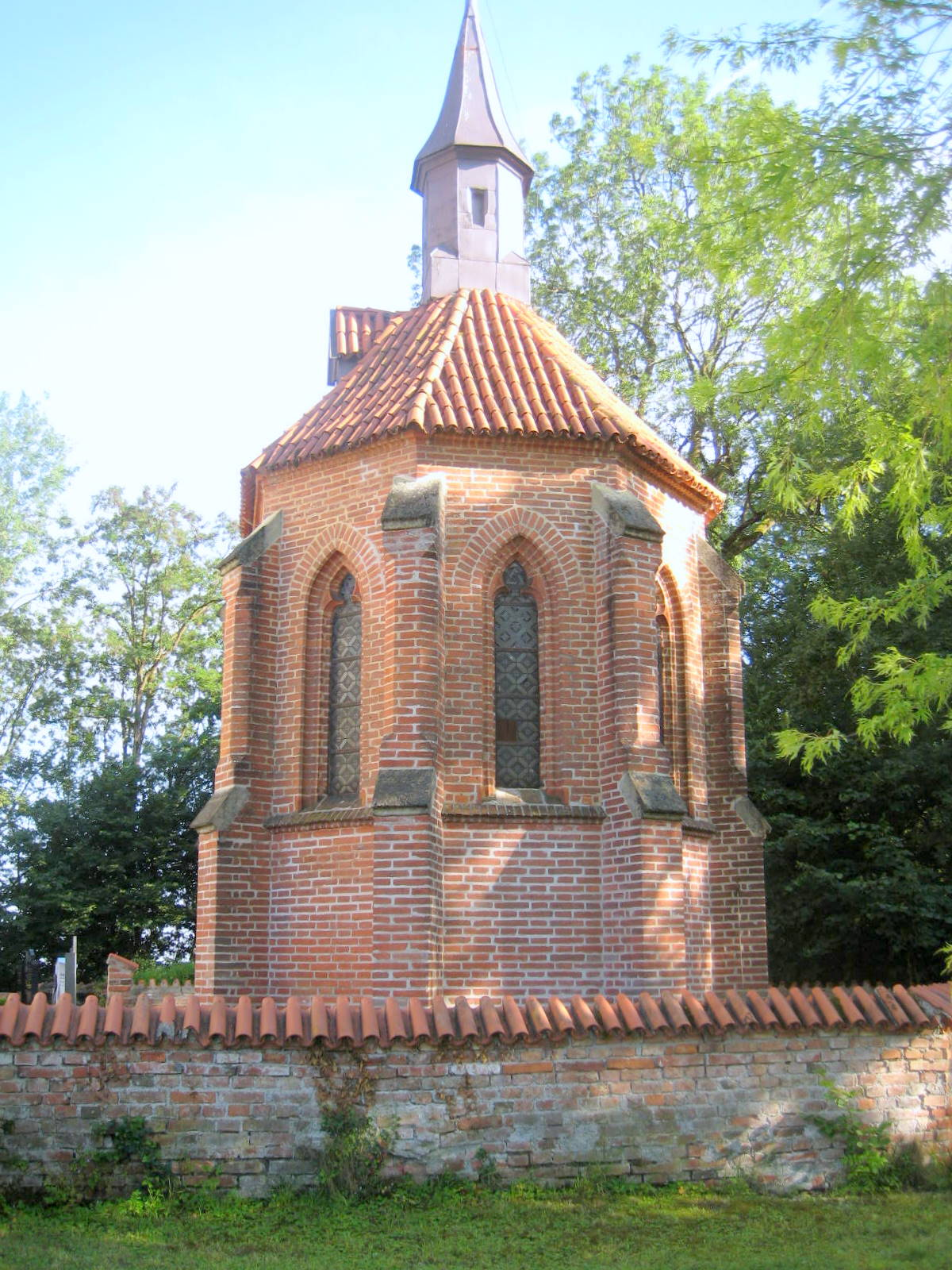 Dies ist die Gruftkapelle der Grafen die am Rande des Friedhofs steht; von der Straße her aufgenommen.